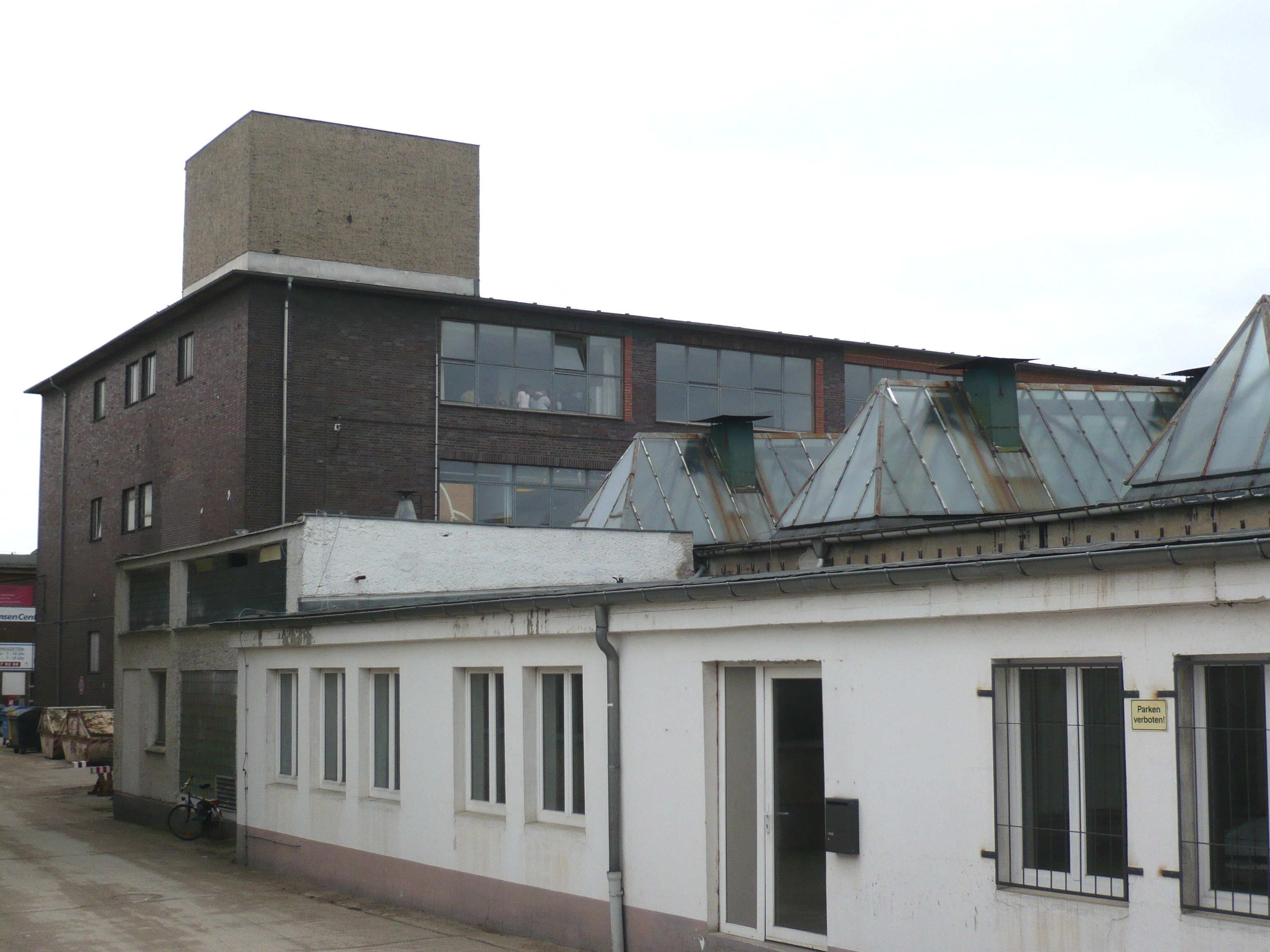 ehemaliges Wälzlagerwerk in der Josef-Orlopp-Straße